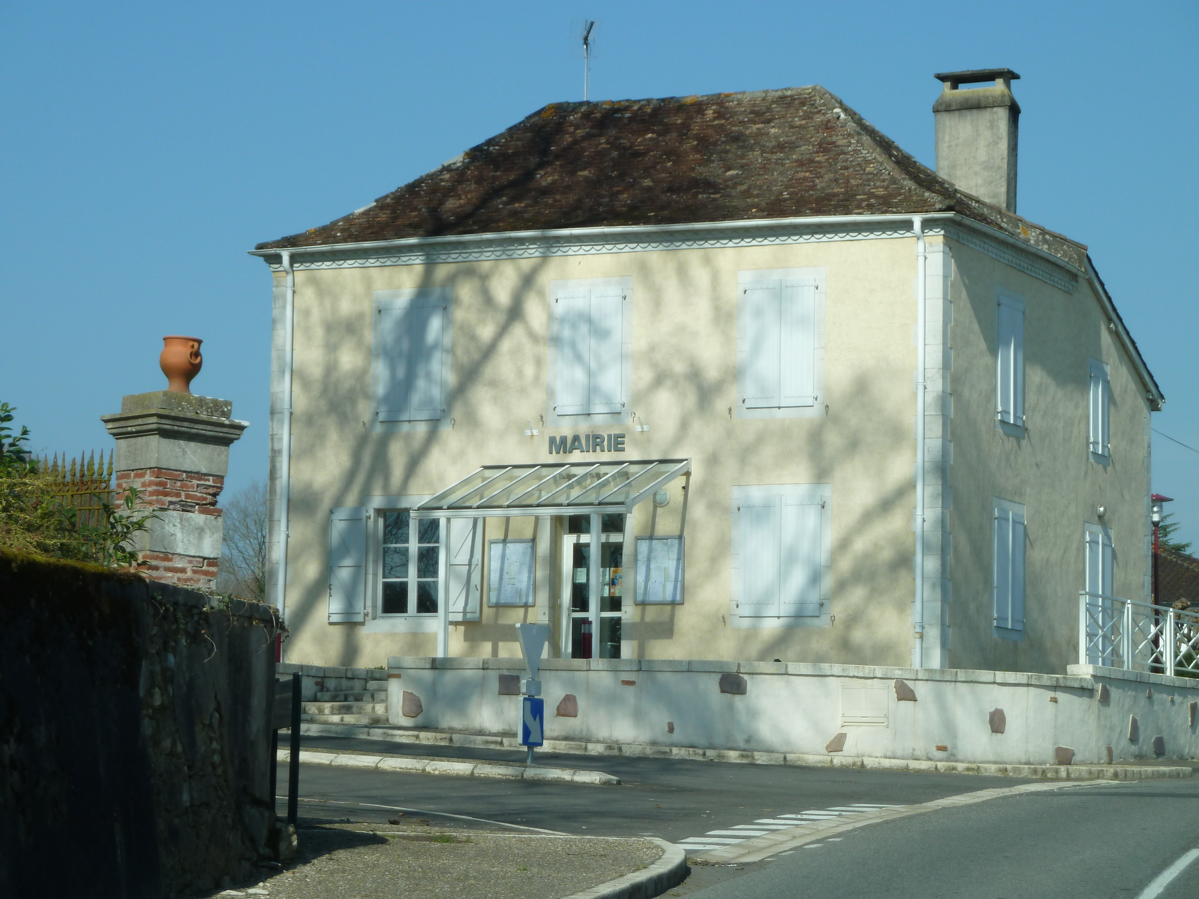 Mairie de Laà-Mondrans